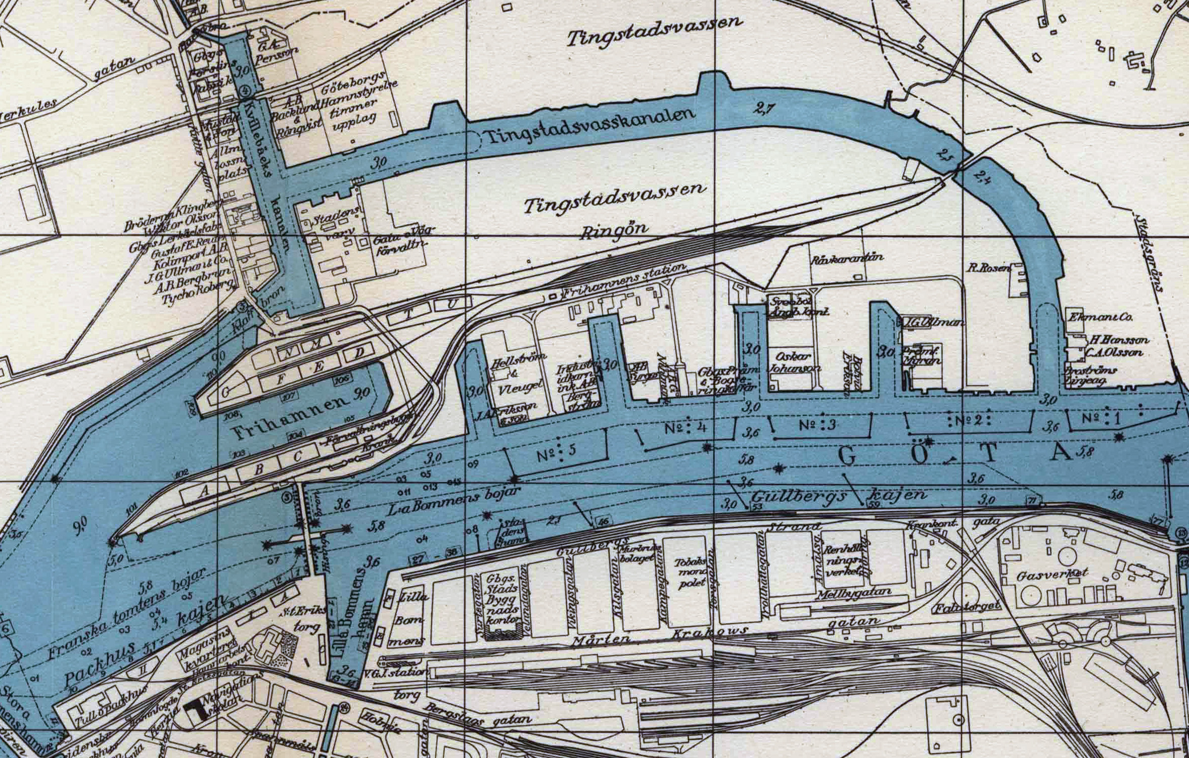 Ringön, Göteborg. Karta